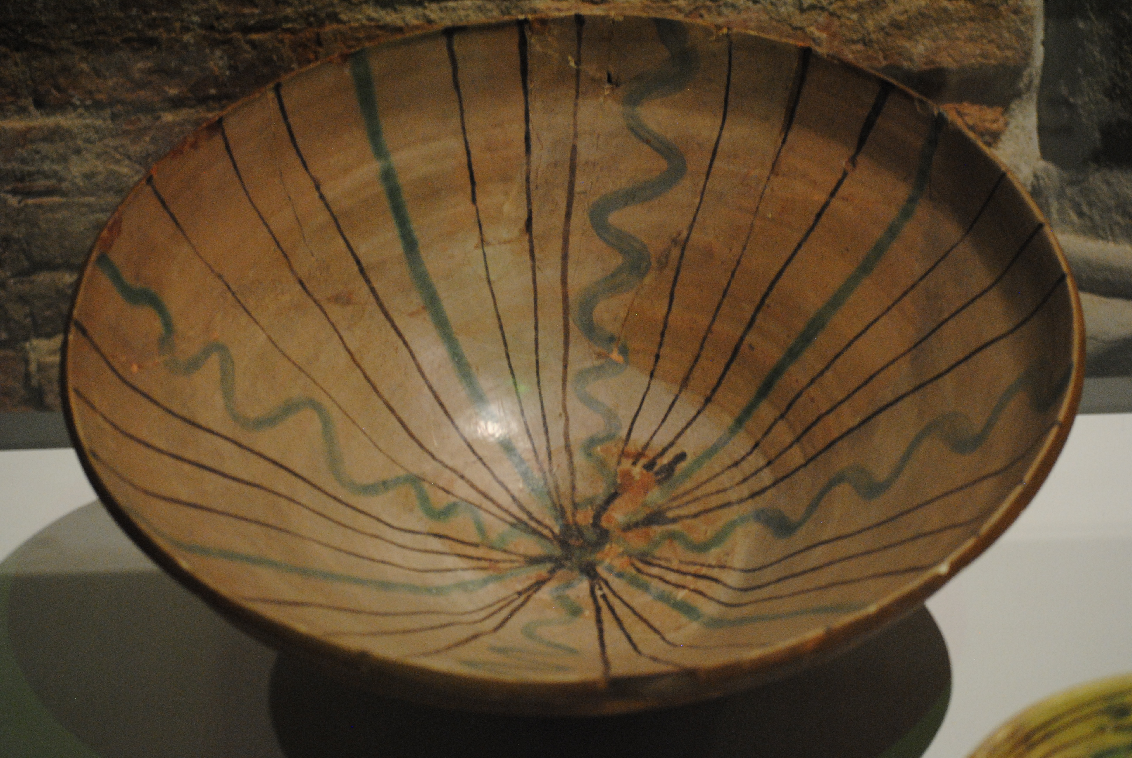 Catino in maiolica arcaica di Pisa, risalente al XIV secolo (appartenente alla collezione Tongiorgi, Pisa) - Museo nazionale di San Matteo.